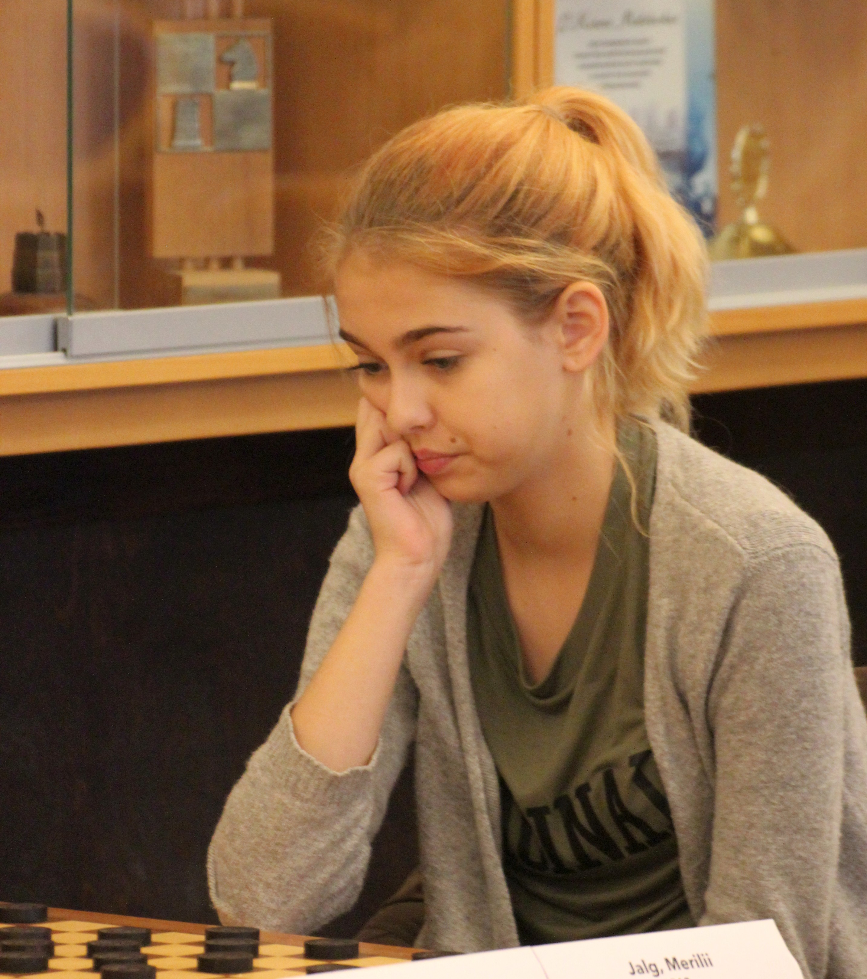 Merilii Jalg naiste maailmameistrivõistlustel Tallinnas Paul Kerese Malemajas.